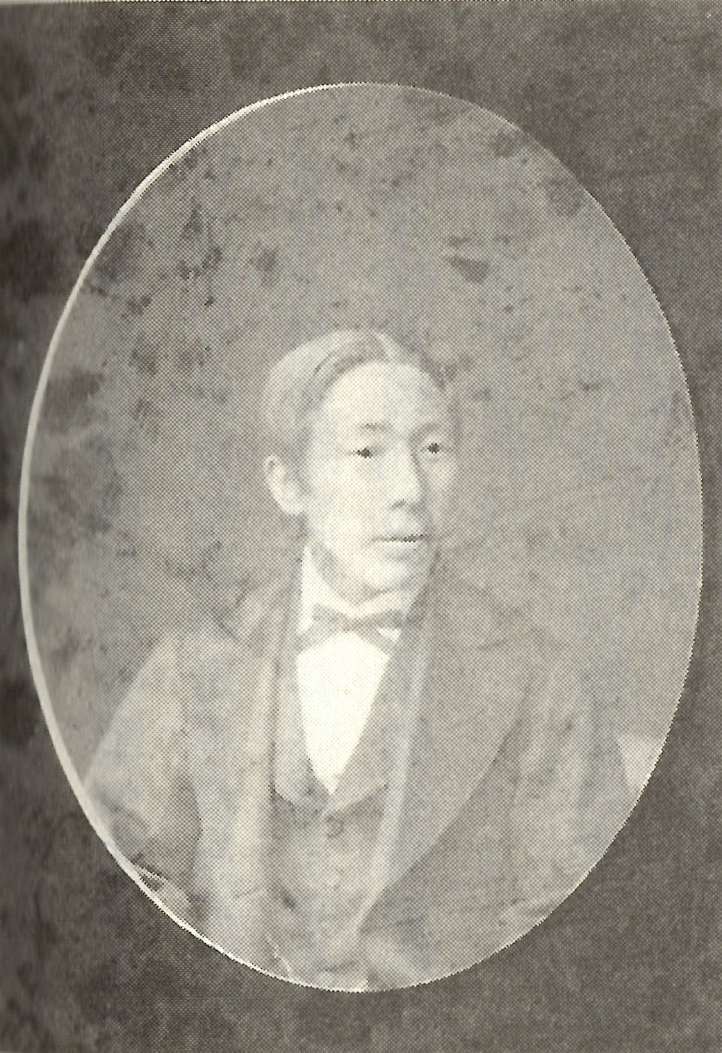 穂波経度の肖像写真。